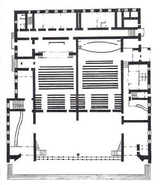 Мінск. План кінатэатра Піянер